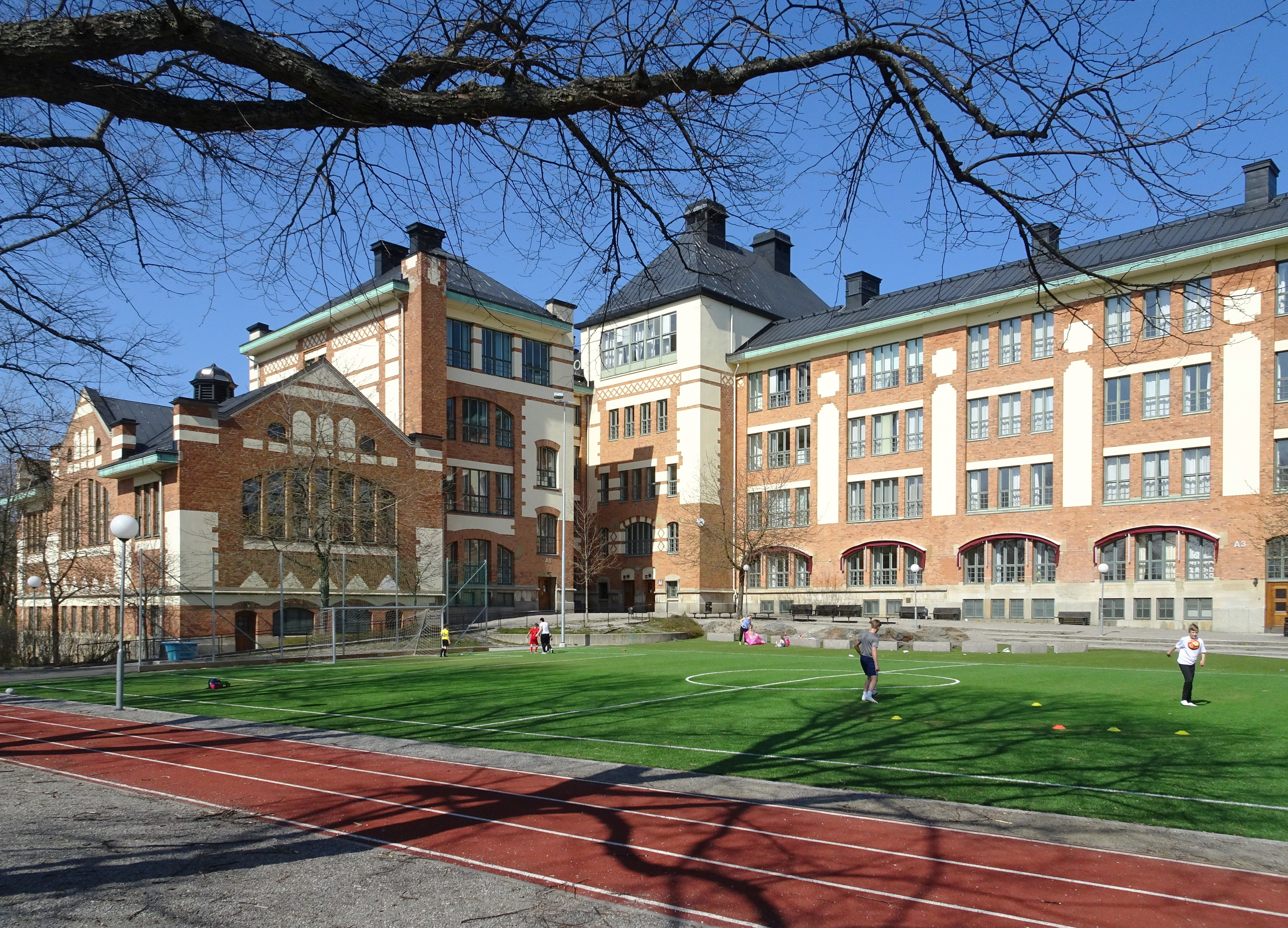 Kungsholmens gymnasium